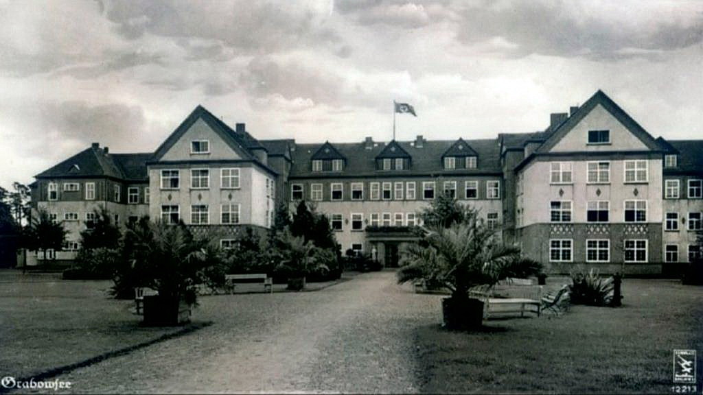 больничный корпус